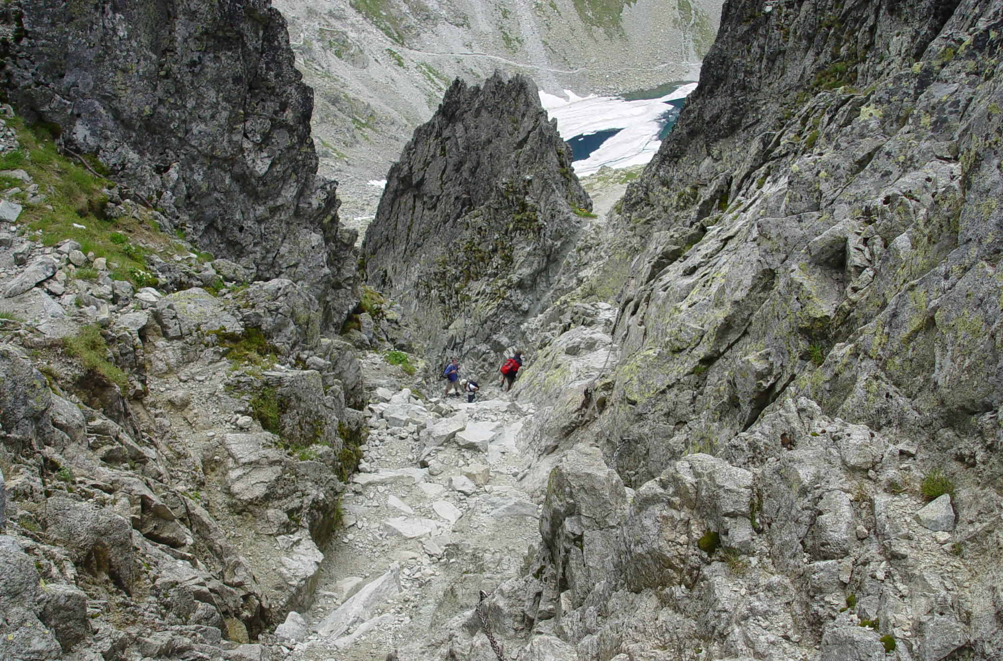 Magas-Tátra,_Rovátkáról_lefelé